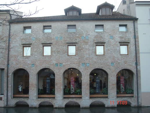 Ca' dei Carraresi Treviso